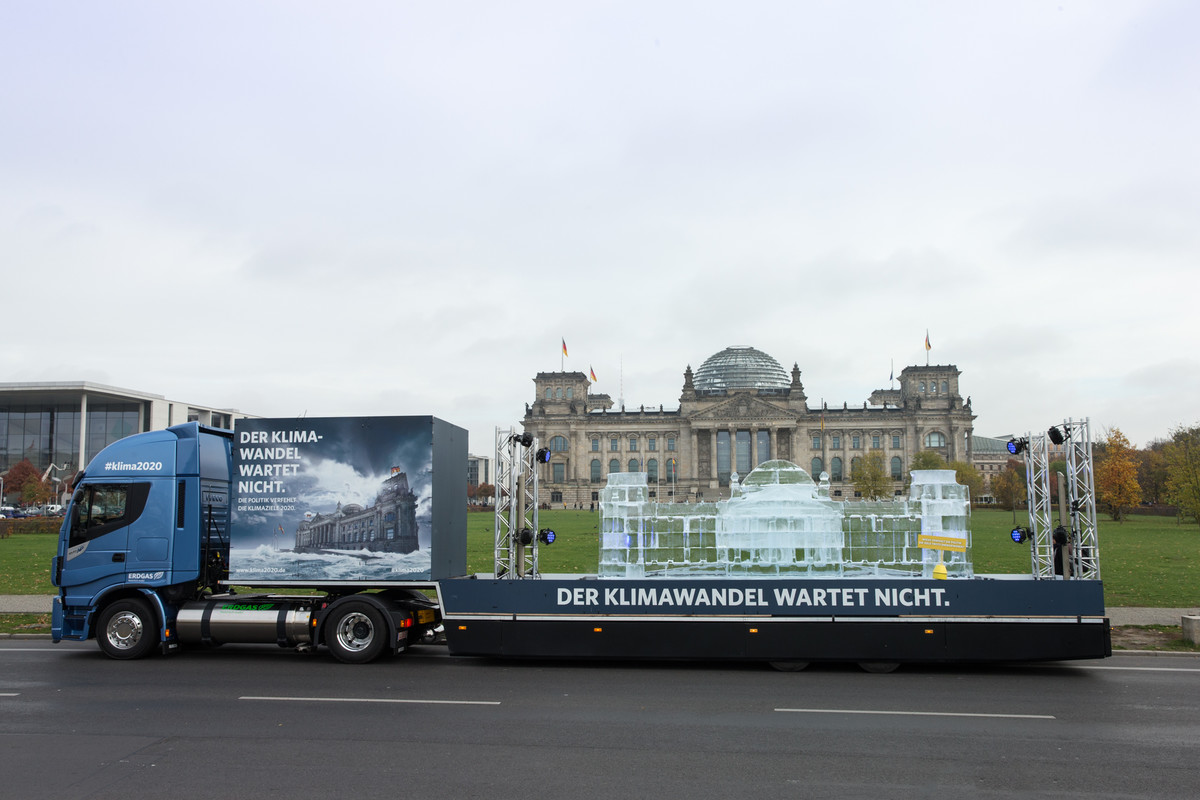 Kampagne von Zukunft ERDGAS mit einem LNG Truck und dem Eismodell des Reichstags vor dem Reichstag